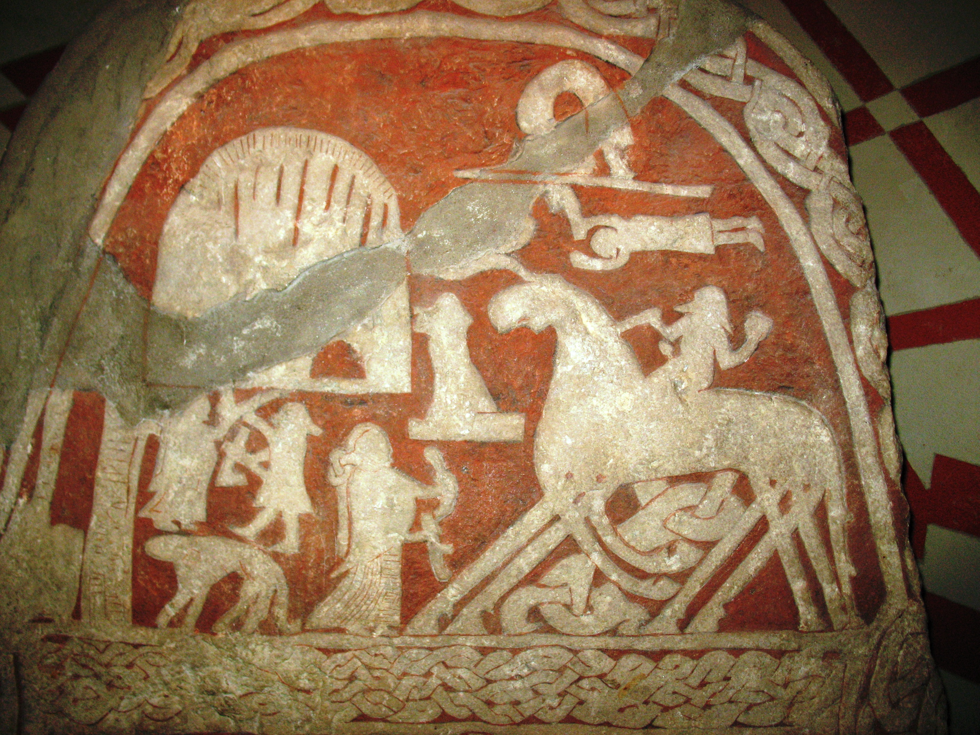 image stone from from Tjängvide, Alskog Gotland (Go 110)